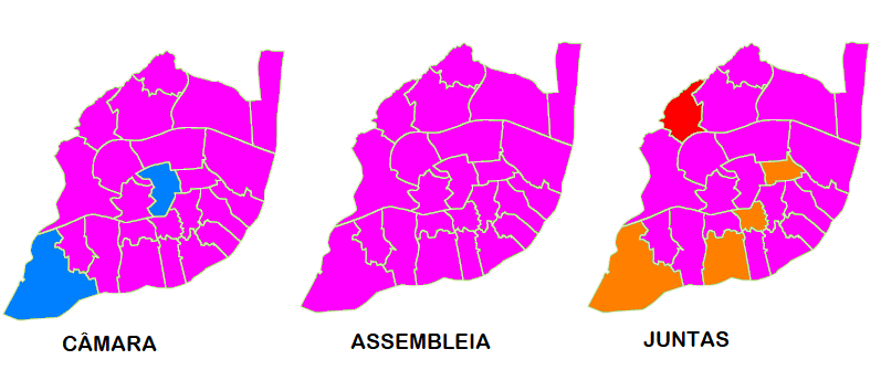 Mapa ilustrativo da lista mais votada por freguesia nas eleições autárquicas